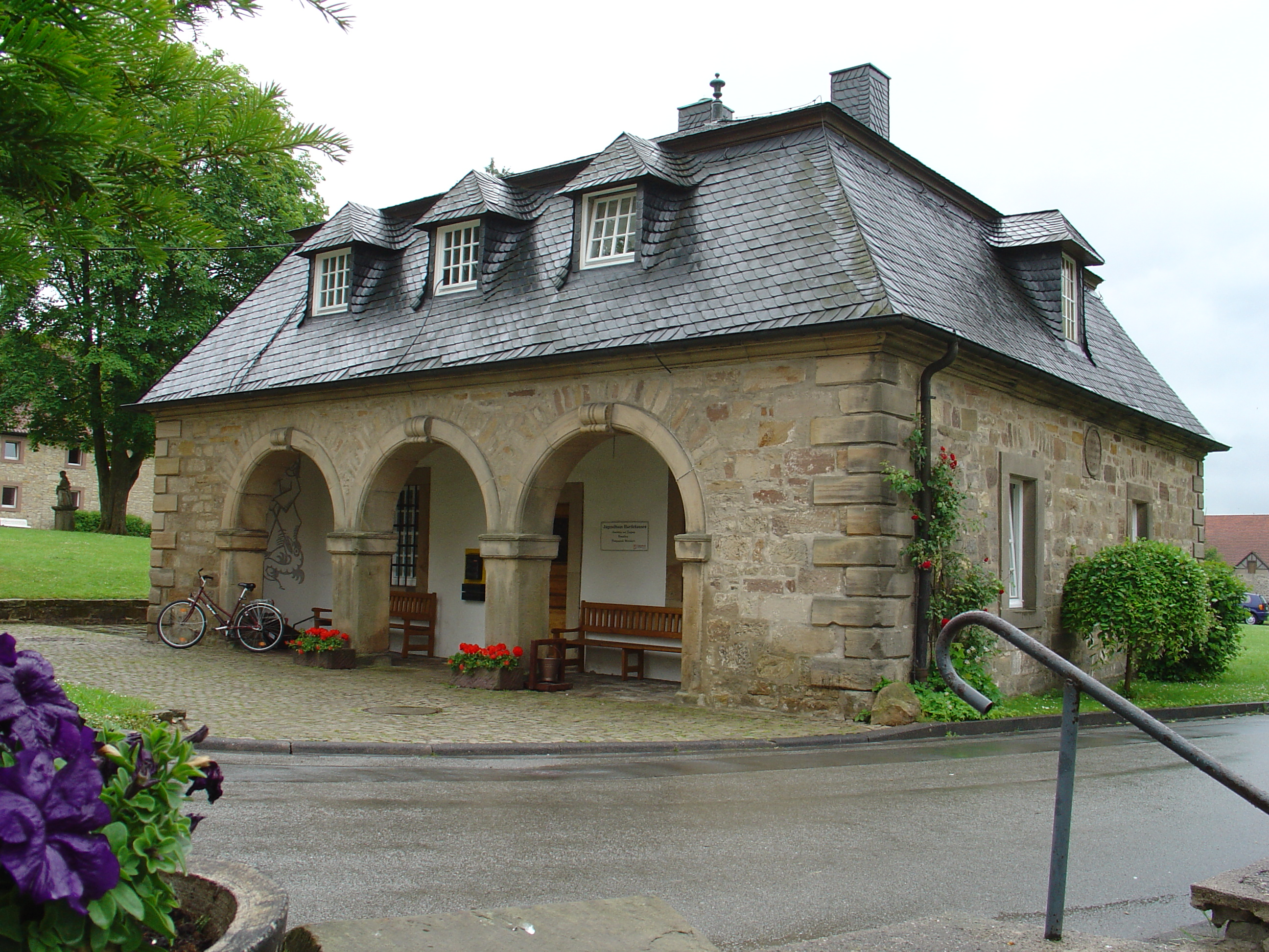 Eingang zur Klostermühle in Hardehausen